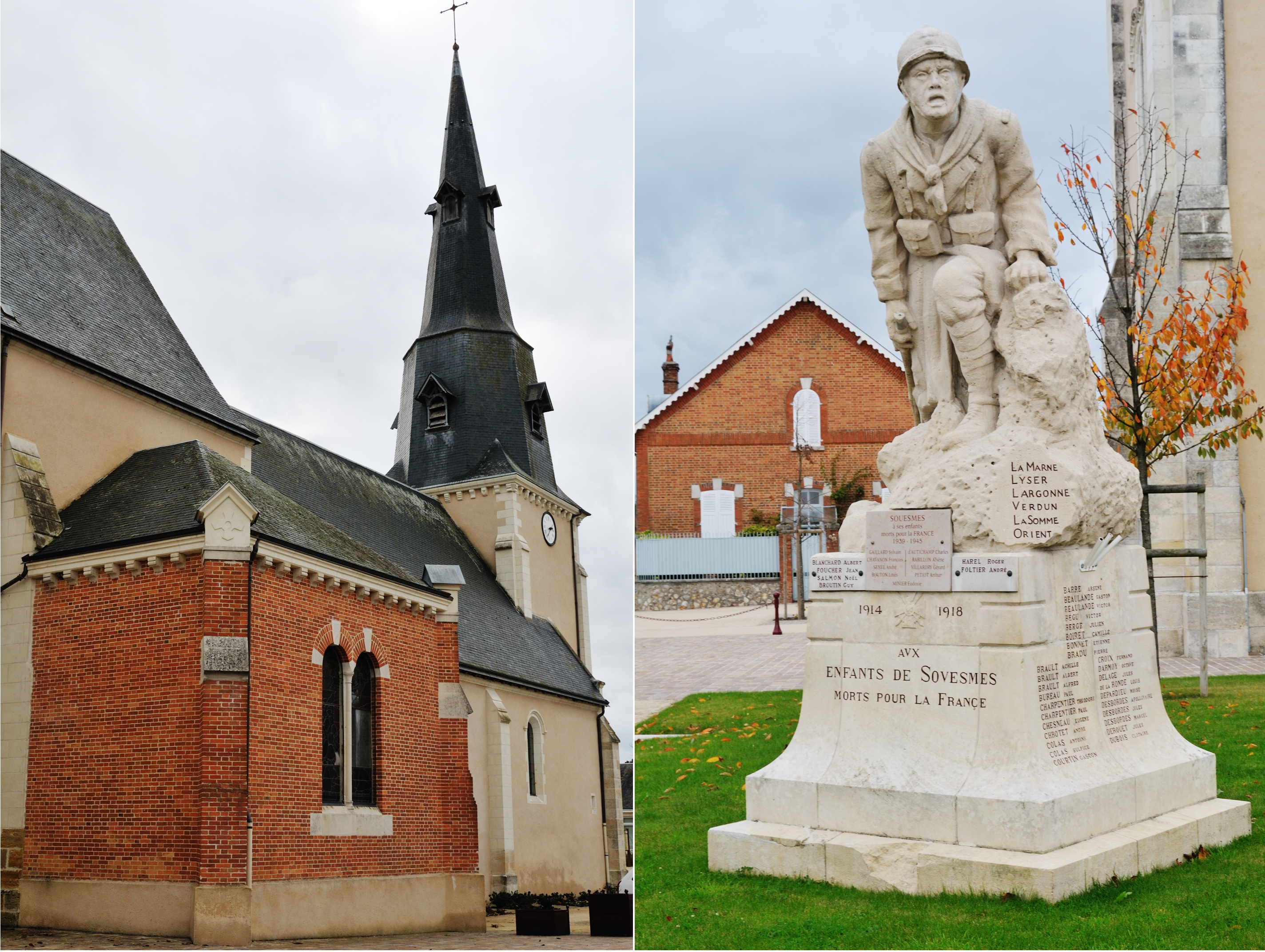 Assemblage de deux photos (église Saint-Julien et monument aux morts) de Souesmes, Loir-et-Cher, France